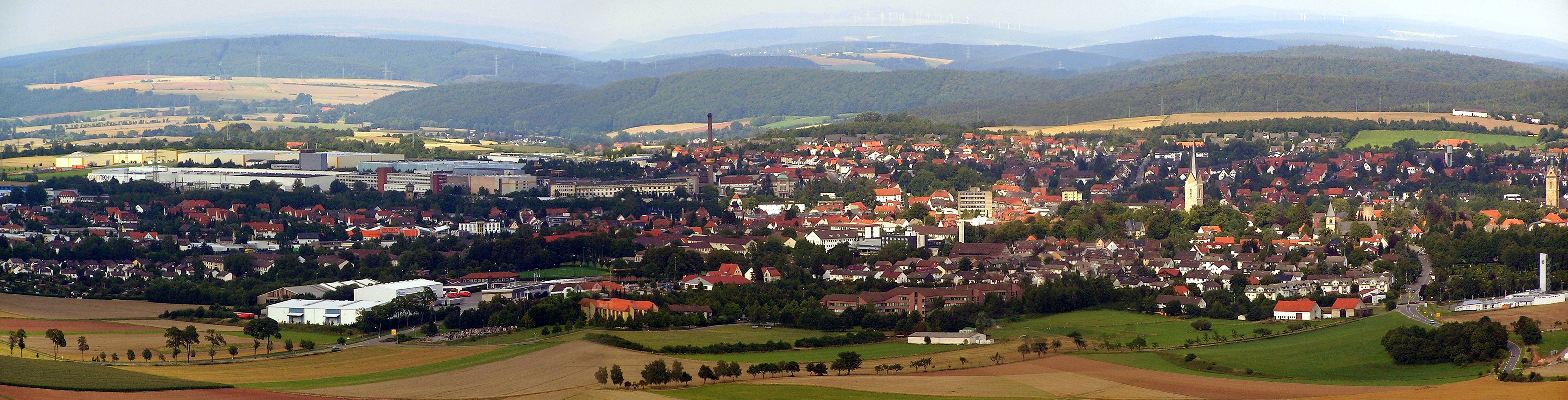 Korbach Panorama Blick vom Eisenberg